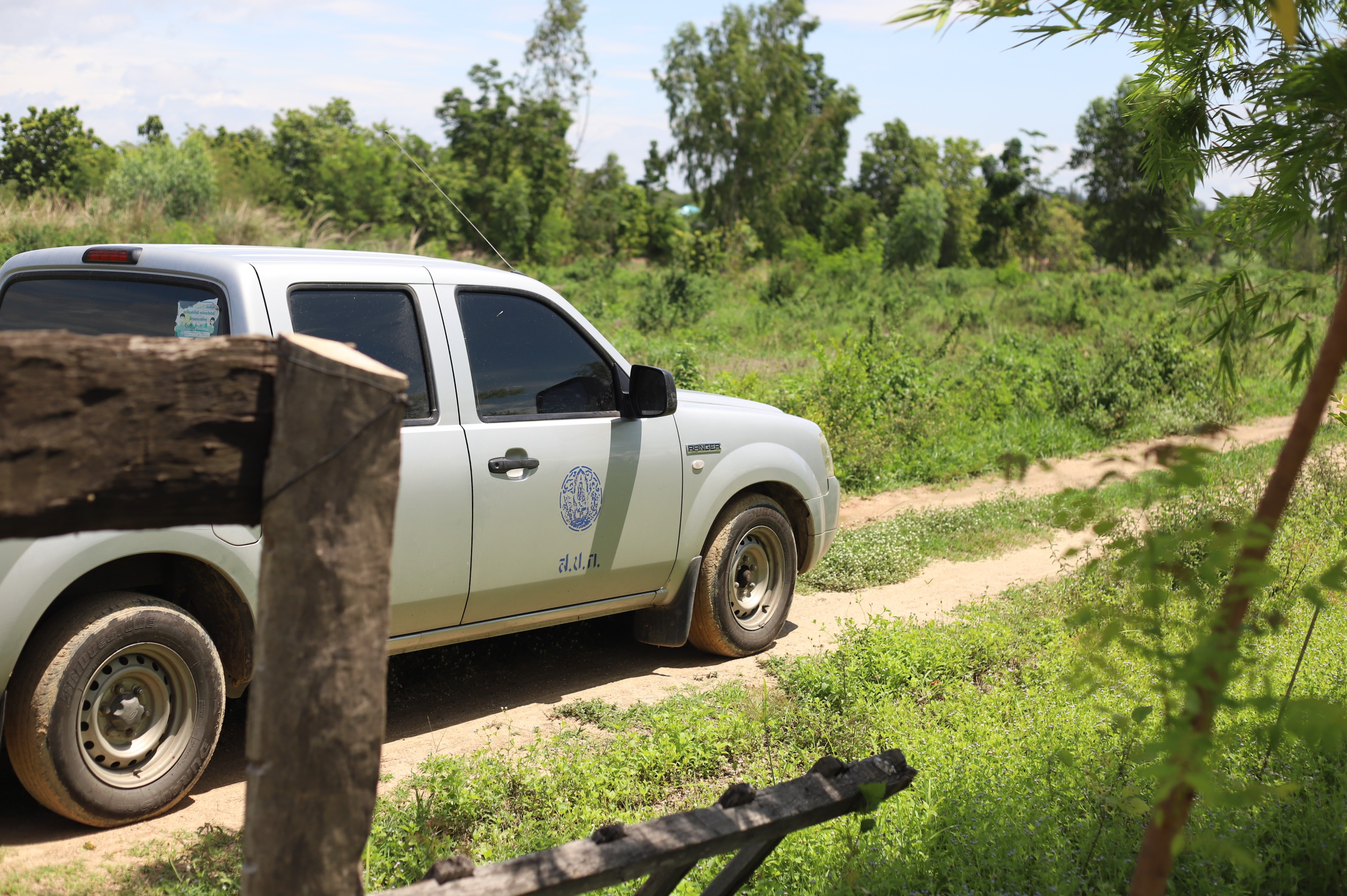 รถยนต์ราชการของ ส.ป.ก. ที่ใช้ในการปฏิบัติหน้าที่ในพื้นที่